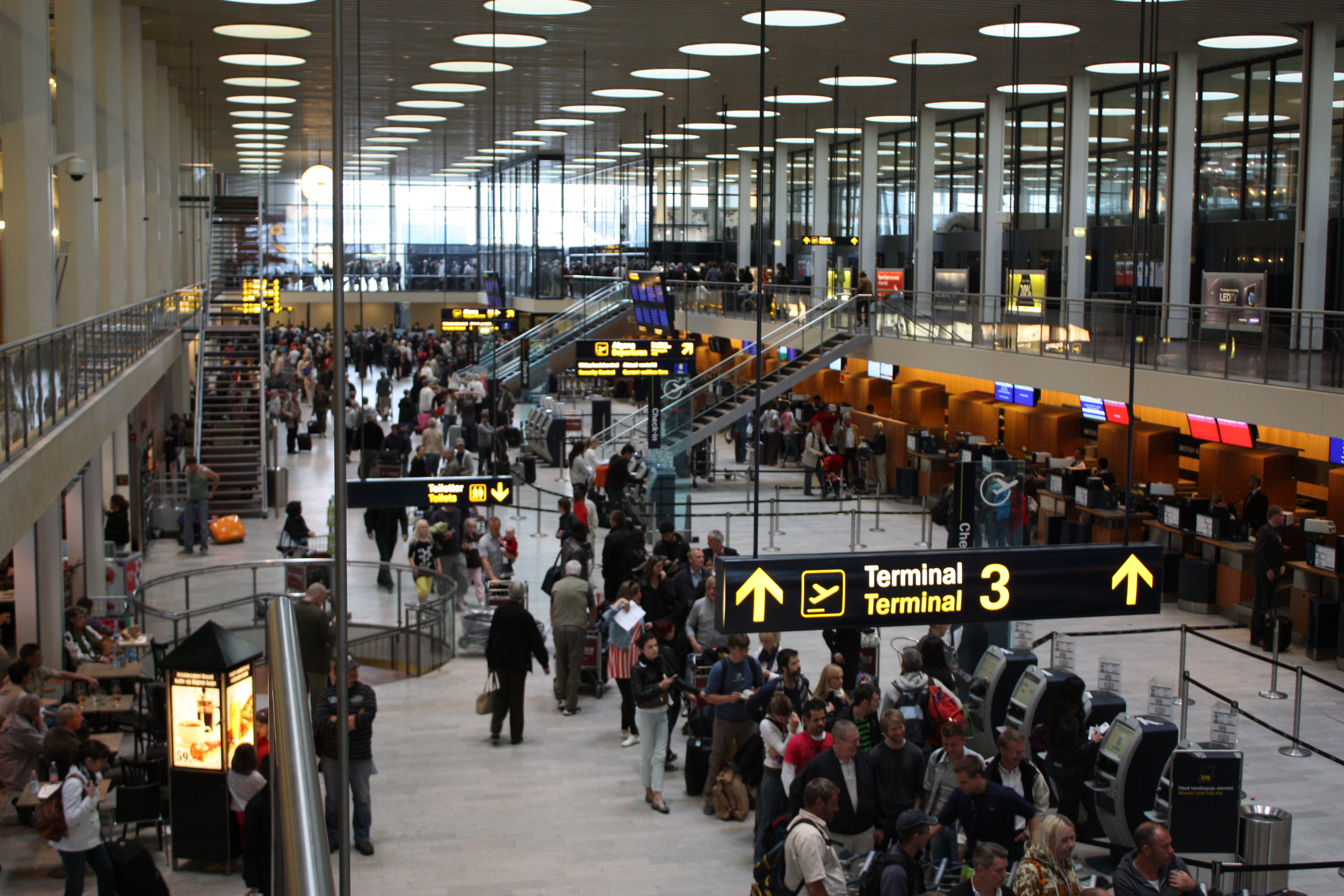 Flughafen Kopenhagen 2009